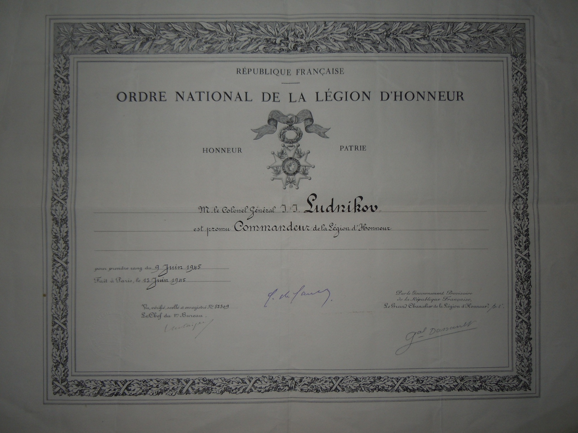 Legion of Honour by I.I.Lyudnikov